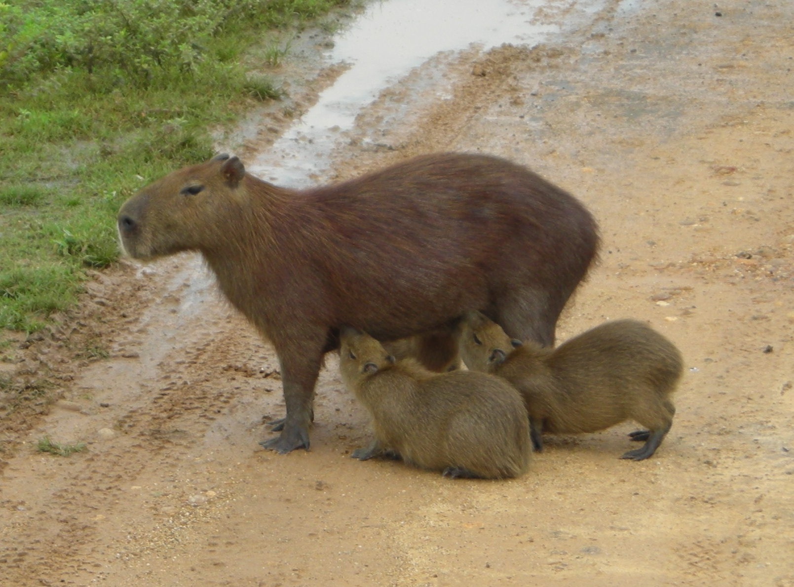 Capybara